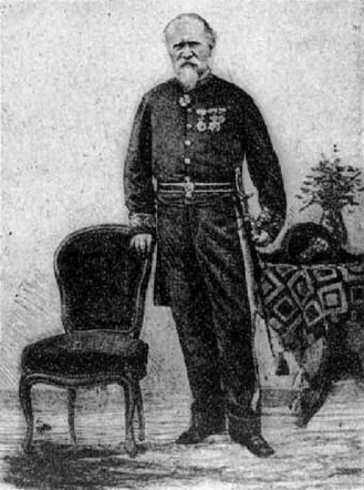 Illustratie van Jean Laborde in Madagascar et la mission catholique (5e éd.) / E. Colin et P. Suau